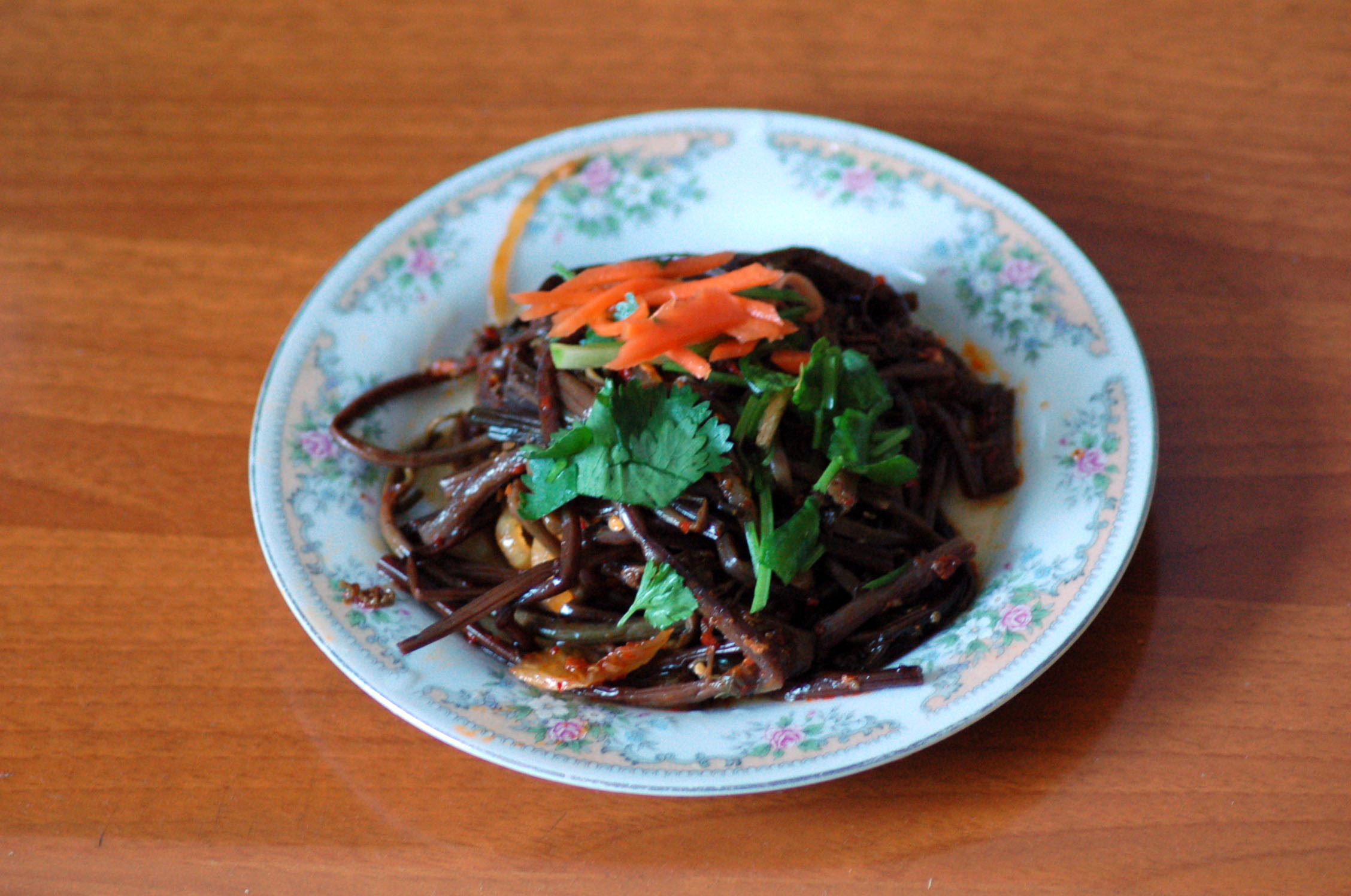 本人願意將此文件上傳致維基百科以便幫助普及知識和豐富條目內容。本照片不涉及任何侵犯版權範圍之內。